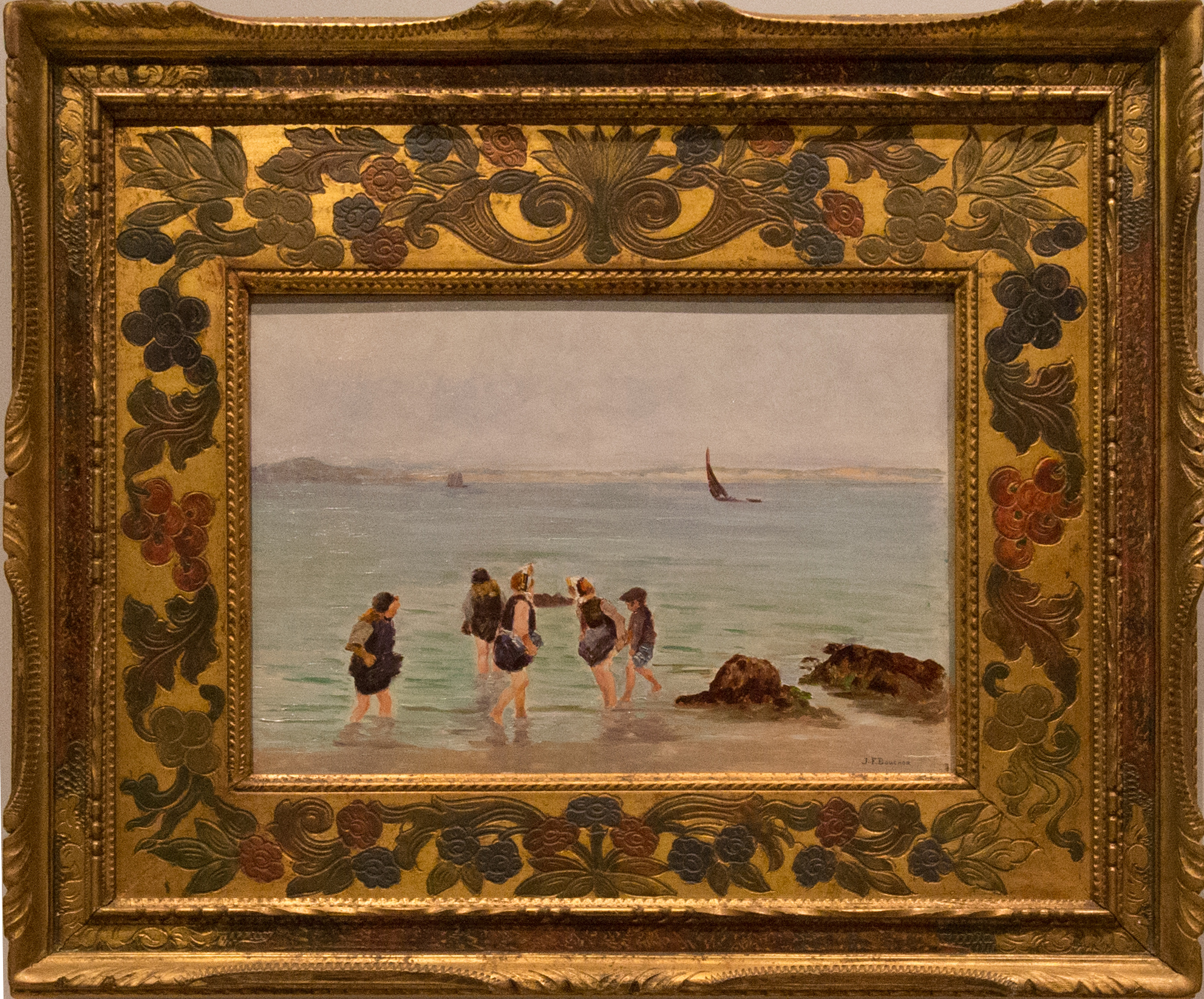 Joseph-Félix Bouchor : Les petites bigoudènes (non daté, huile sur toile, Musée des beaux-arts de Vannes)